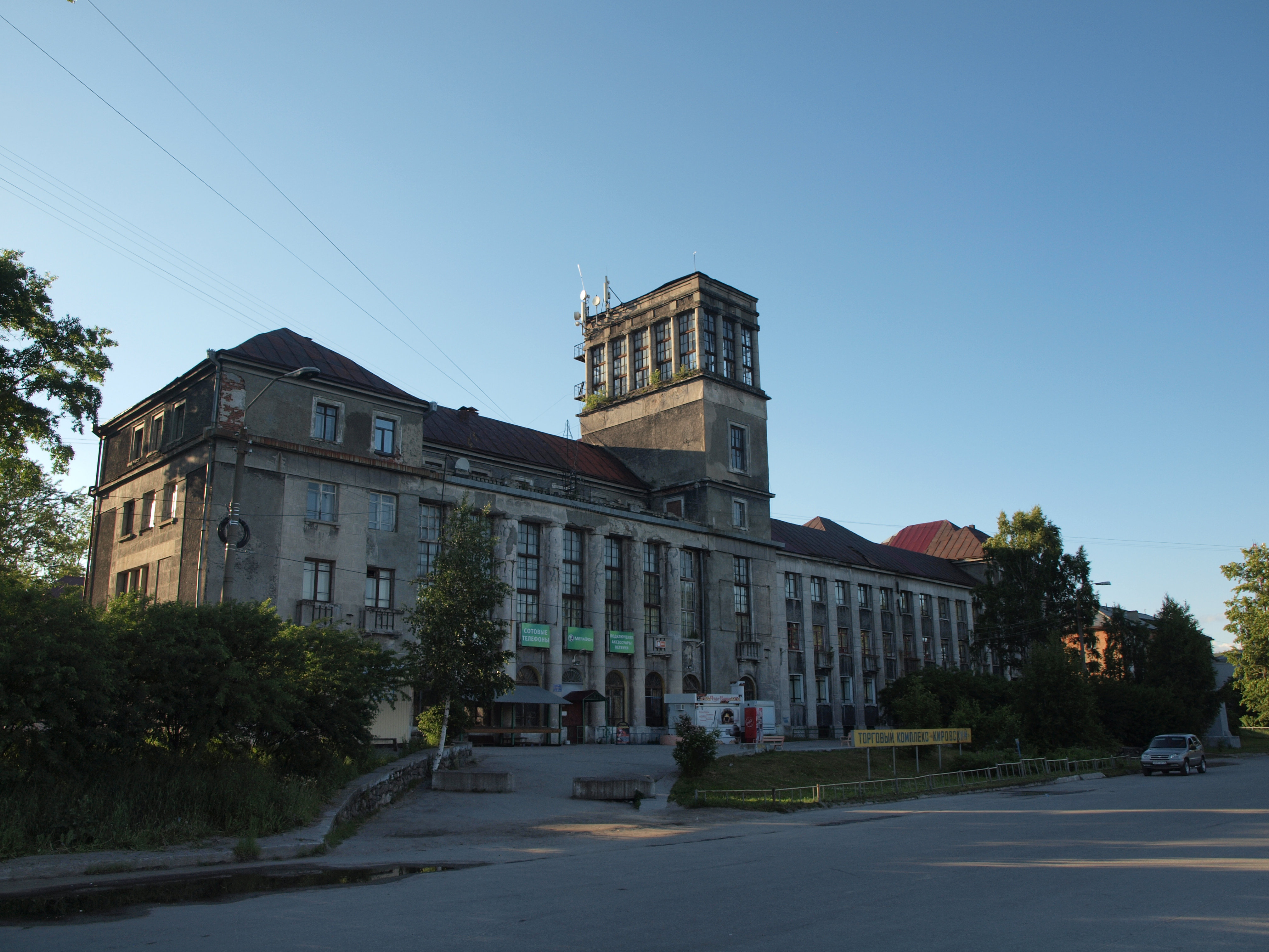 Здание гостиницы управления Беломорско-Балтийского канала: улица Дзержинского, д.22, Медвежьегорск, Медвежьегорский район, Карелия